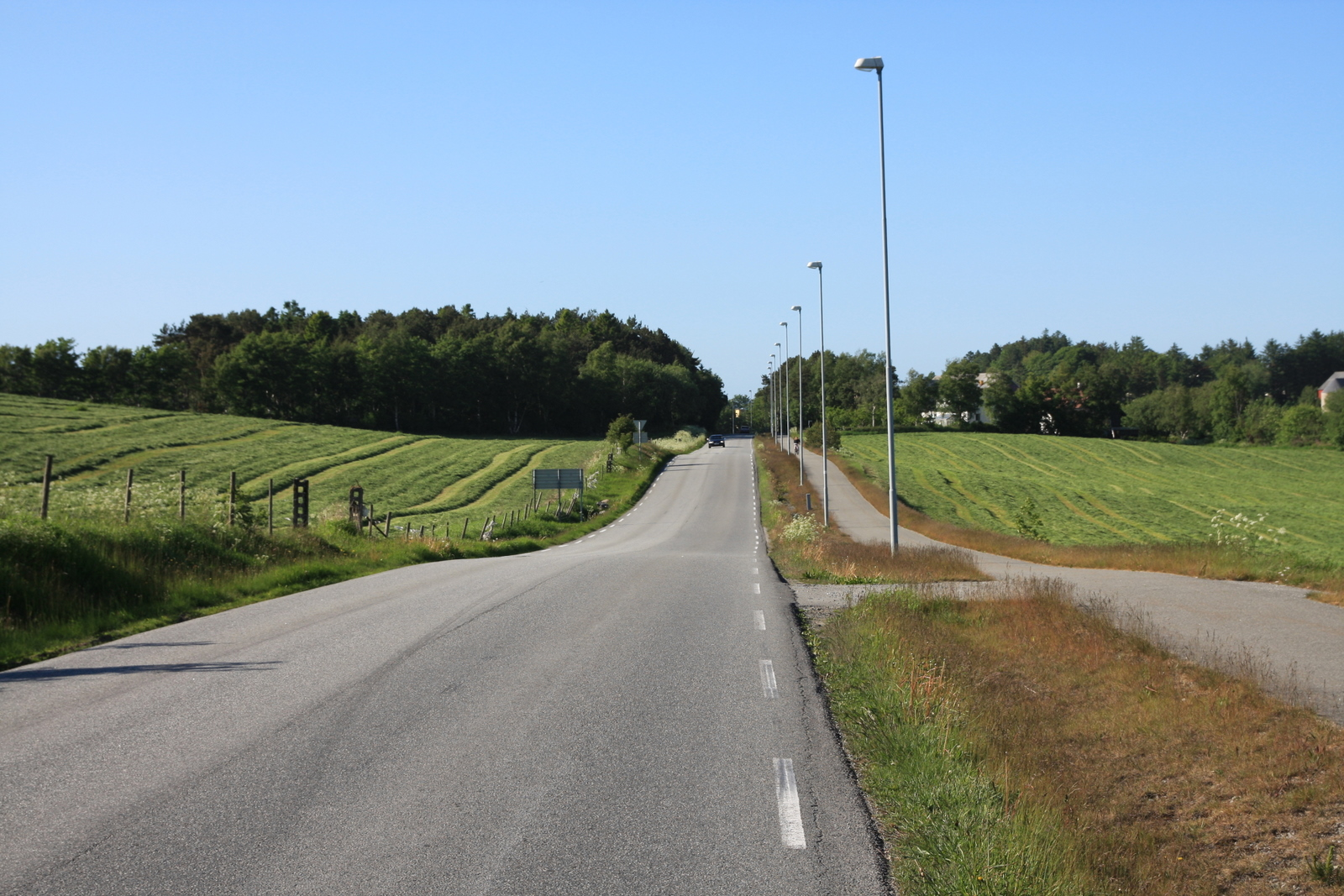 Fylkesvei 253 Klepp Øksnevadveien